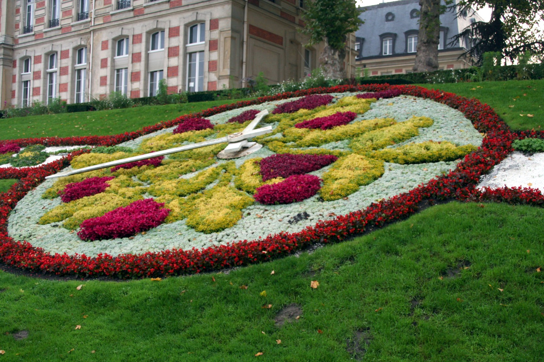 Horloge florale de la mairie de Versailles - Yvelines (France)